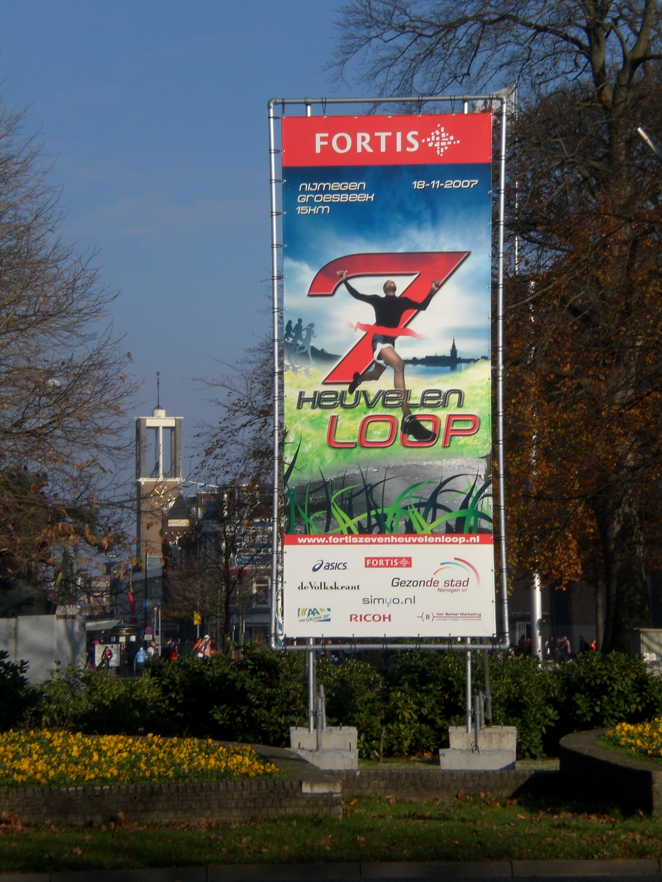 Spandoek Zevenheuvelenloop